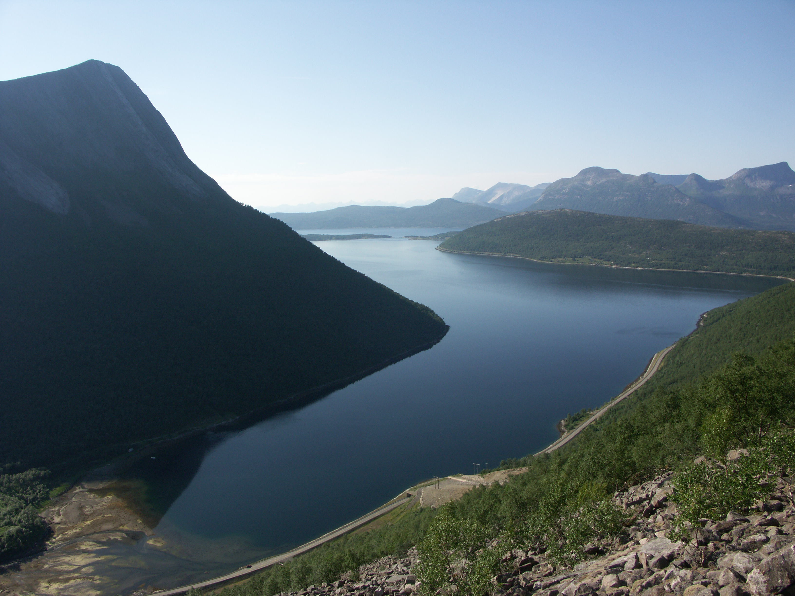 Tømmeråsfjorden, a branch of Tysfjorden in Ofoten, Nordland, Norway